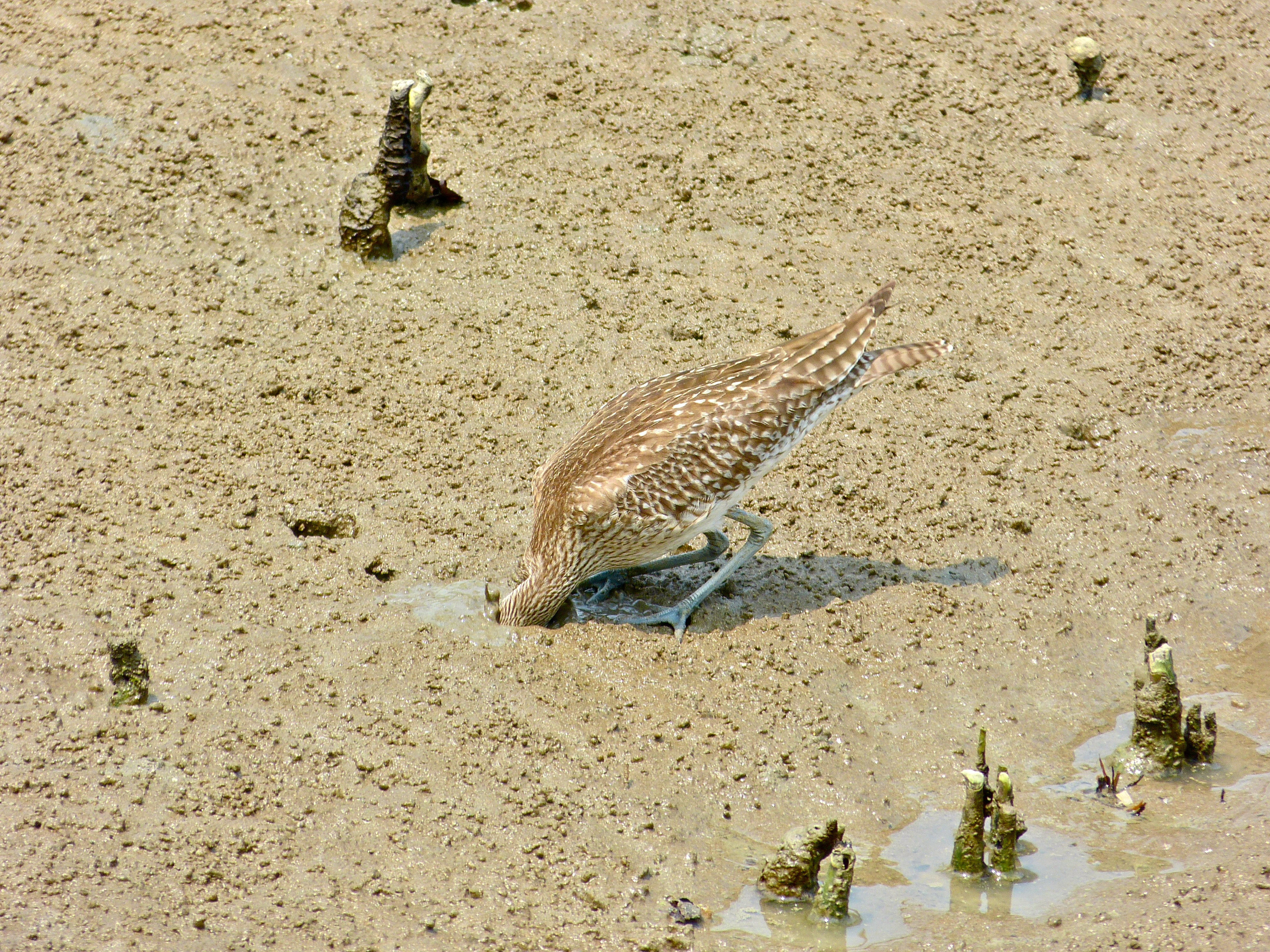 Bako NP, Sarawak, MALAYSIA